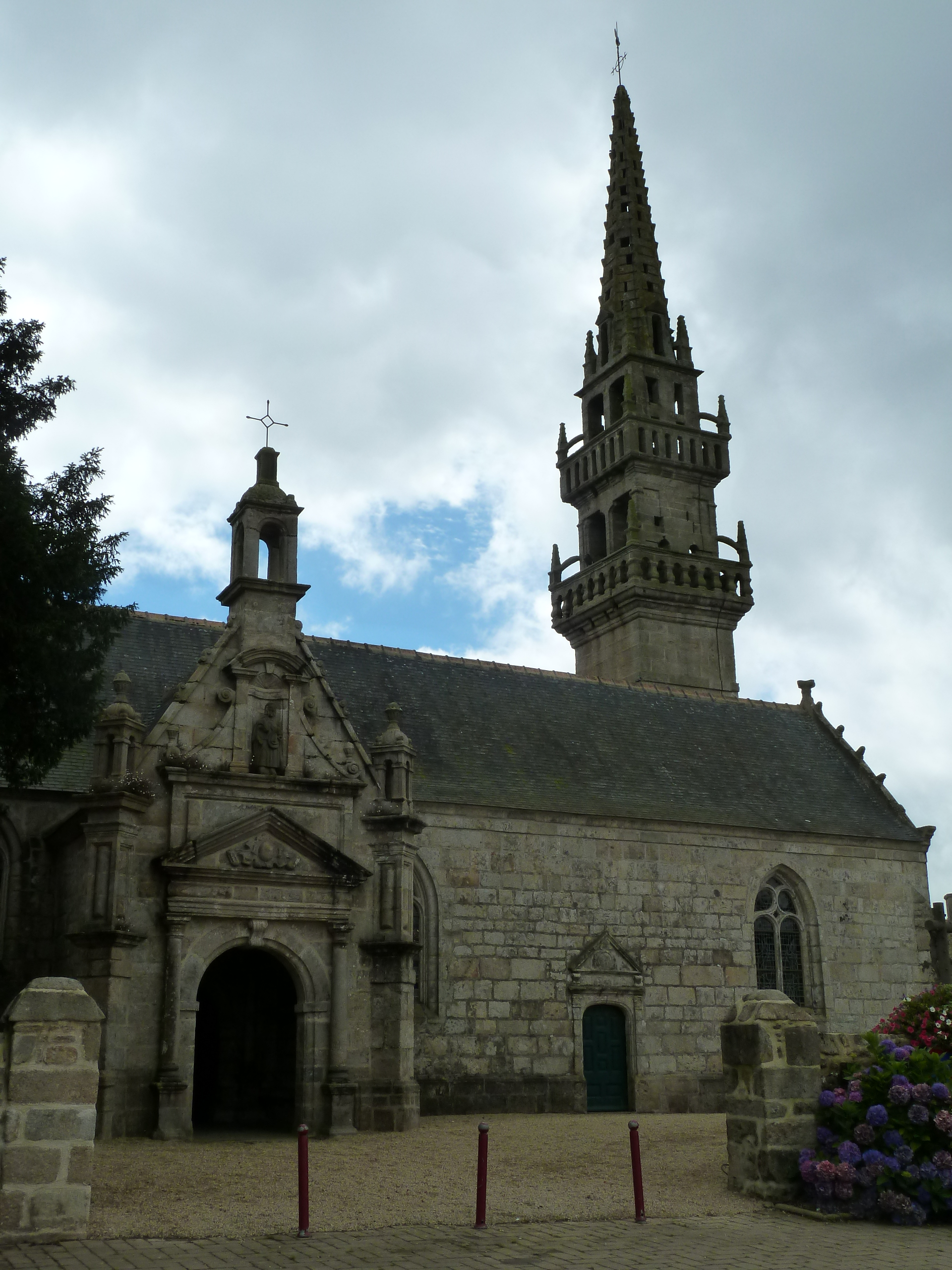 Église Saint-Edern de Plouédern